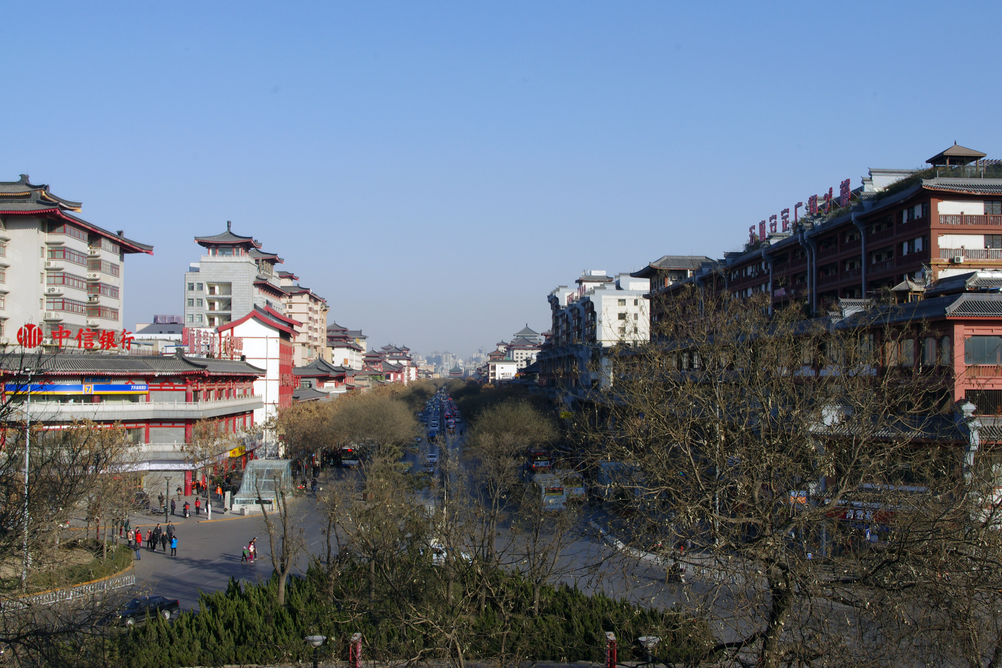 西安西大街